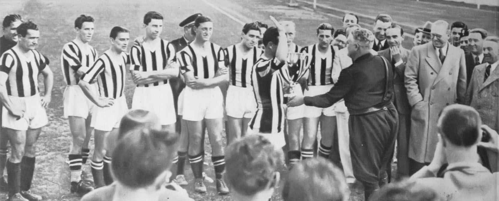 Torino, stadio Municipale Benito Mussolini, 8 maggio 1938. Il capitano della Juventus, Mario Varglien (I), intento a eseguire il saluto romano come prassi nell'Italia fascista, riceve dal presidente della Federazione Italiana Giuoco Calcio, generale Giorgio Vaccaro, il trofeo della Coppa Italia 1937-38 al termine della vittoriosa finale di ritorno contro i concittadini del Torino (2-1): si trattò del primo successo nella competizione per la squadra bianconera, nonché della prima finale di Coppa Italia assegnata in una stracittadina (Torino).